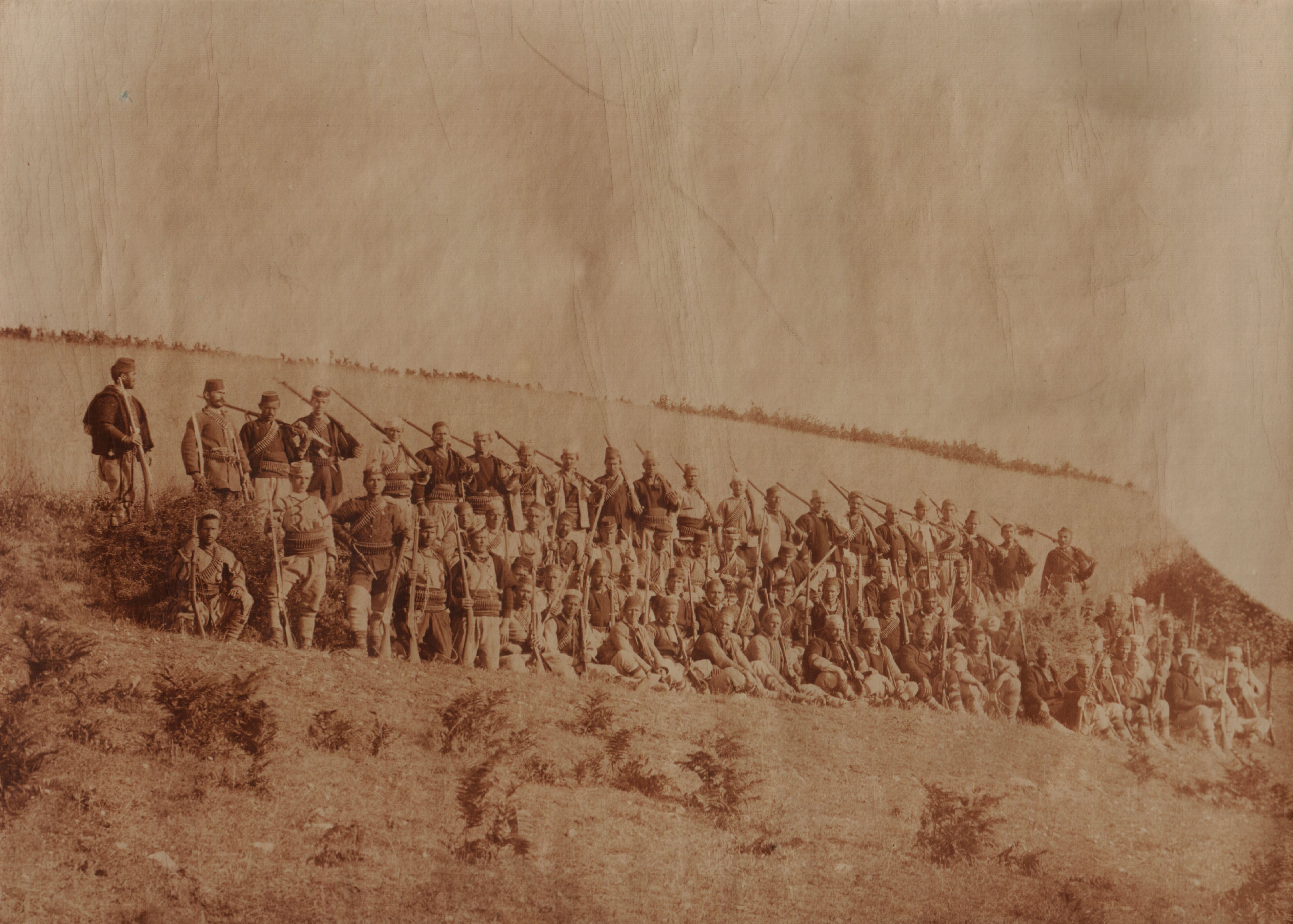 Една от четите на Крушево по време на Илинденско-Преображенското въстание.